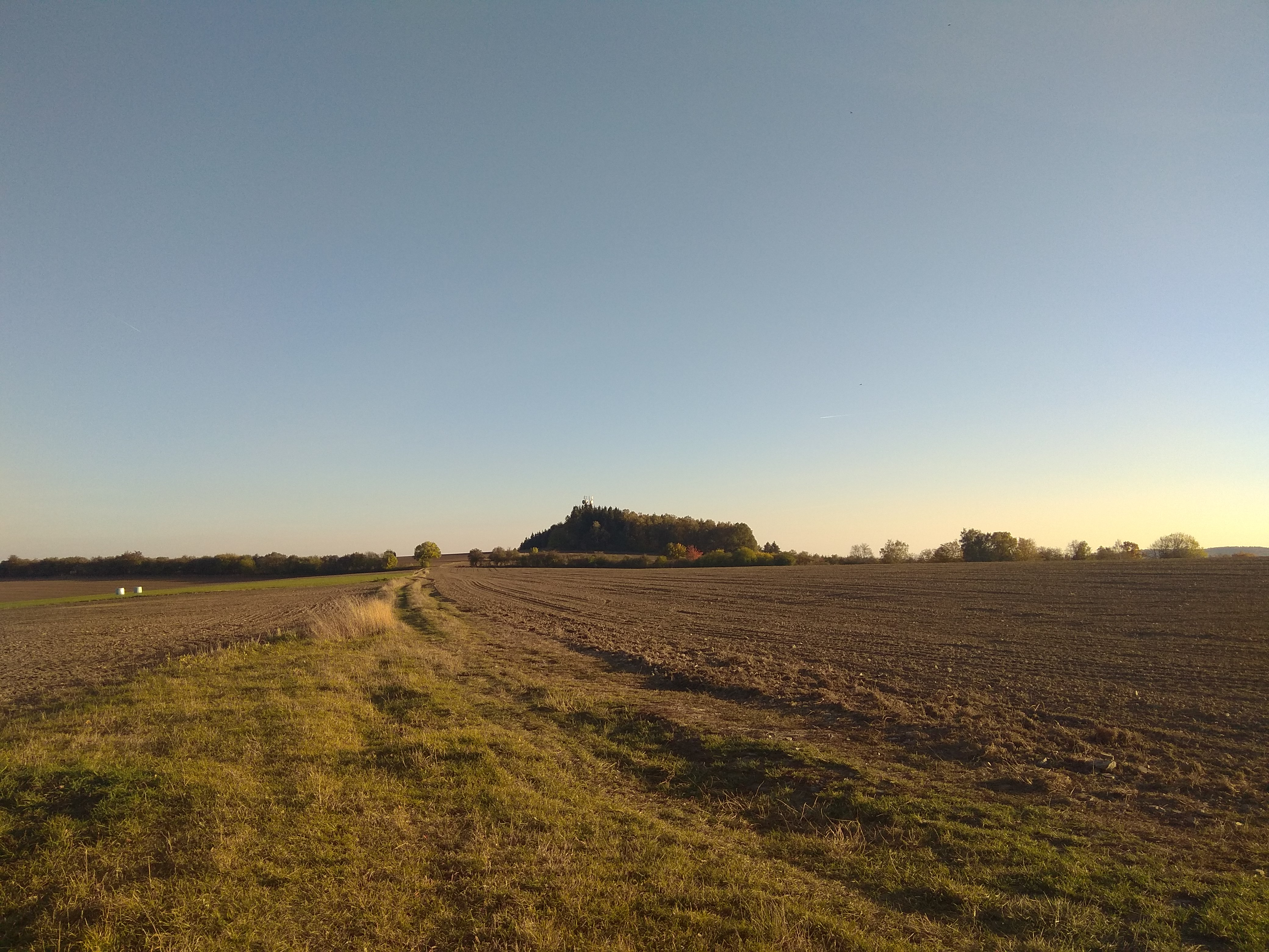 Kopec nedaleko obce Petříkov v okrese Praha-východ